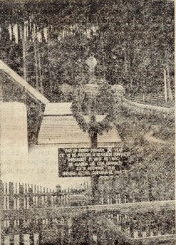 Crucea ridicată la Beliş pe locul arderii celor 25 de cadavre